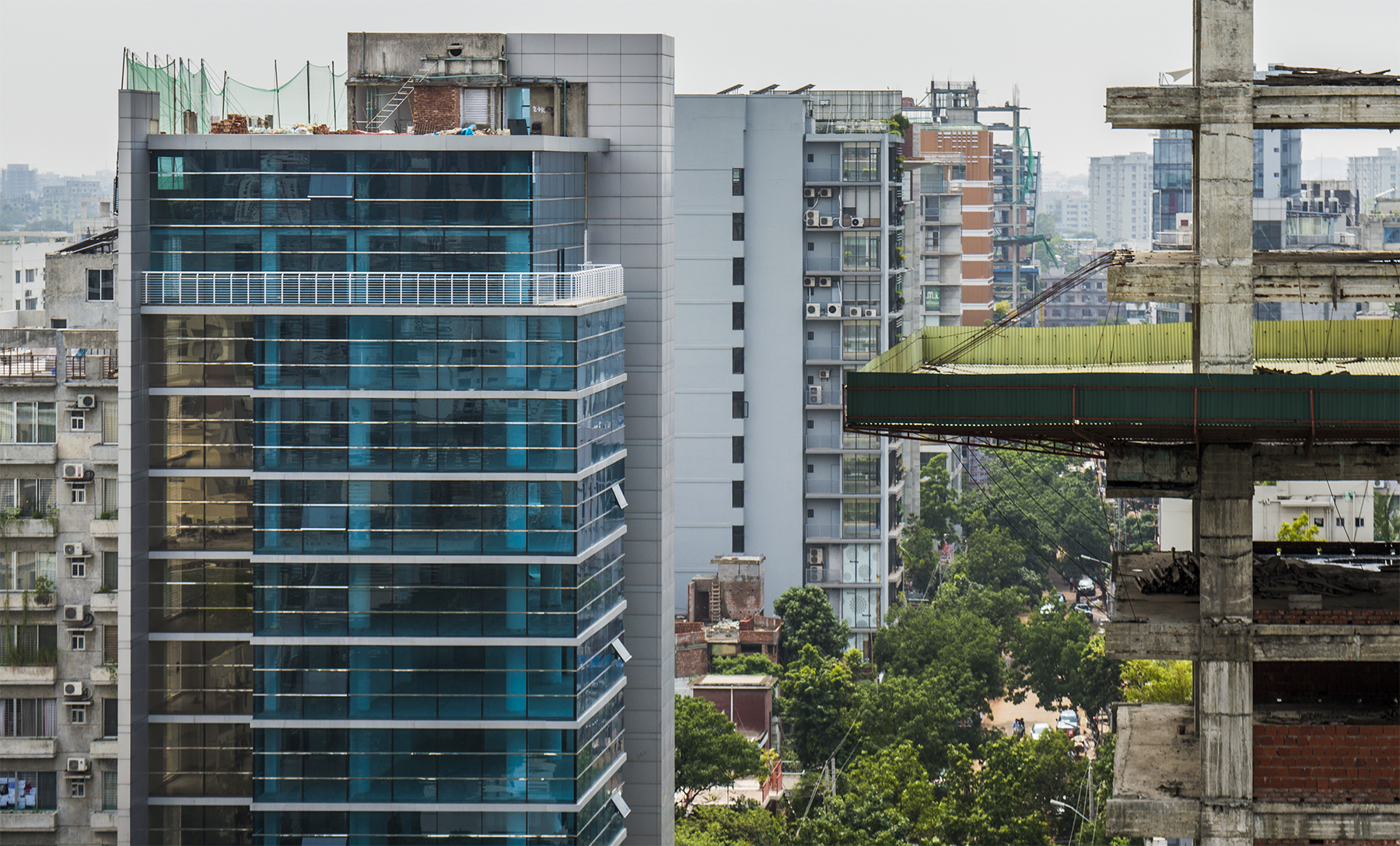 Dhaka